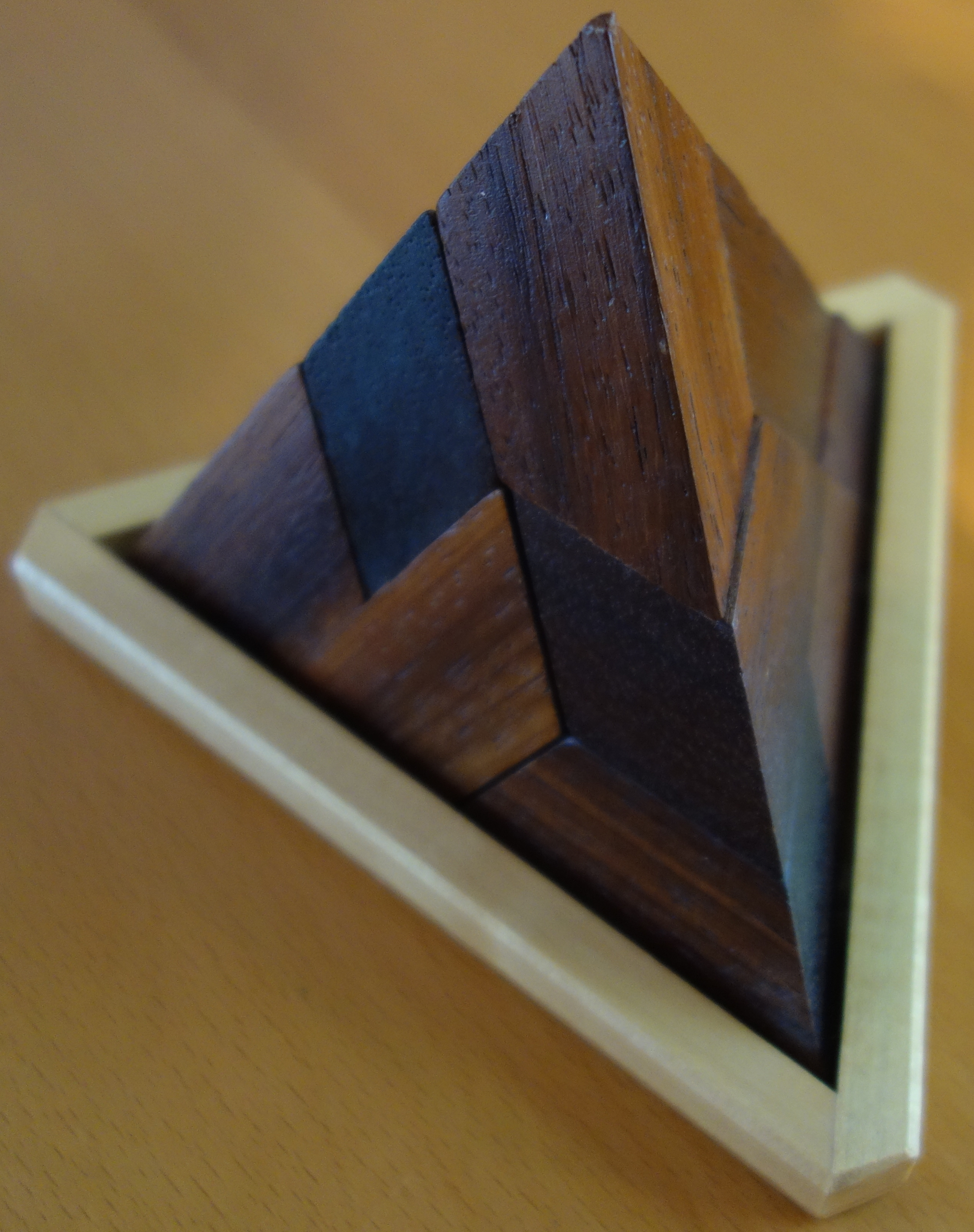 Puzzlepyramide